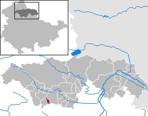 Wolferschwenda in Thuringia - Kyffhäuserkreis